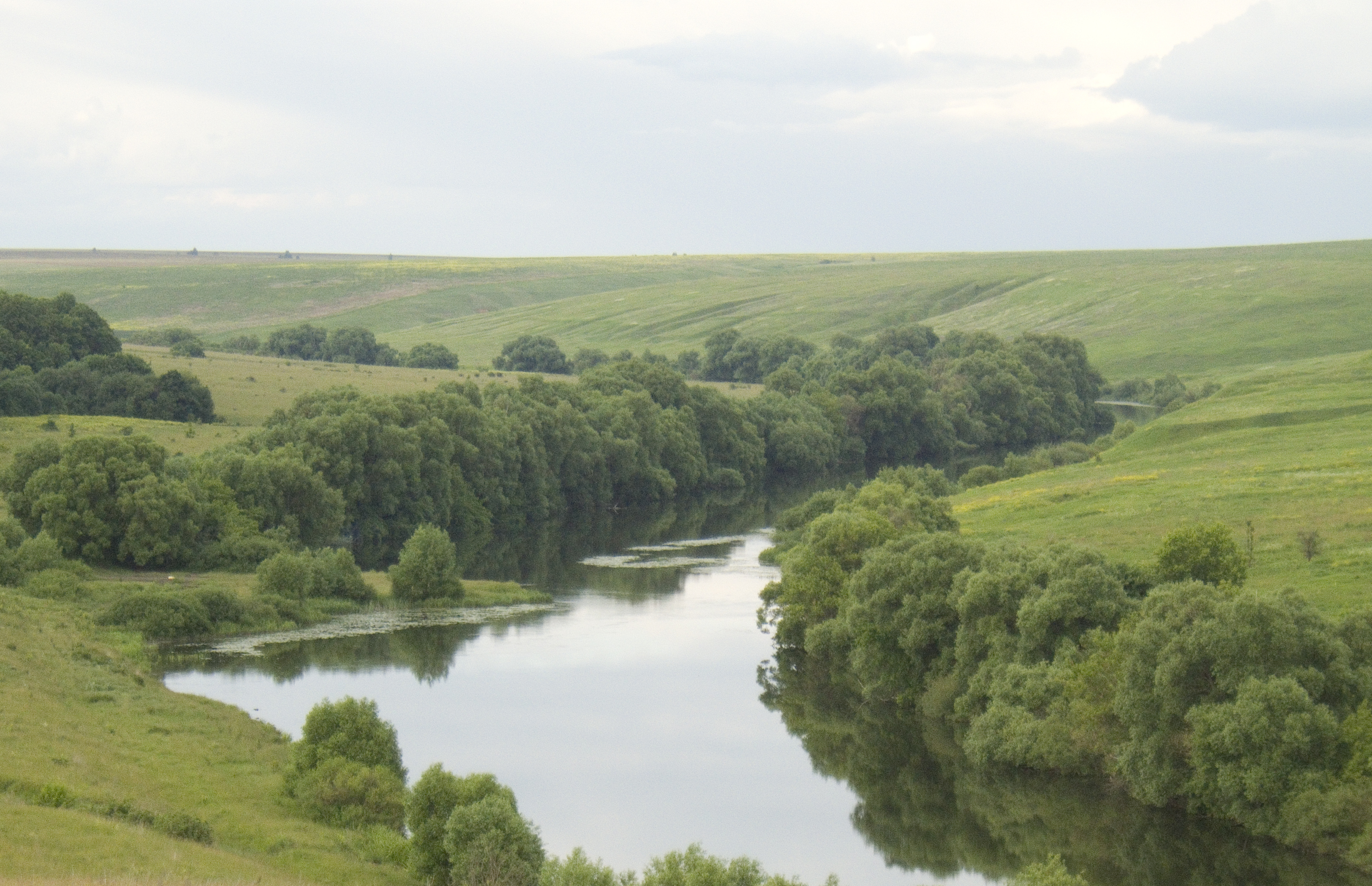 Река Дон у усадьбы Нечаевых в селе Полибино Данковского района Липецкой области.